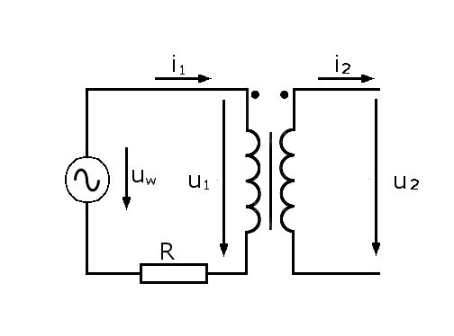 Schaltplan